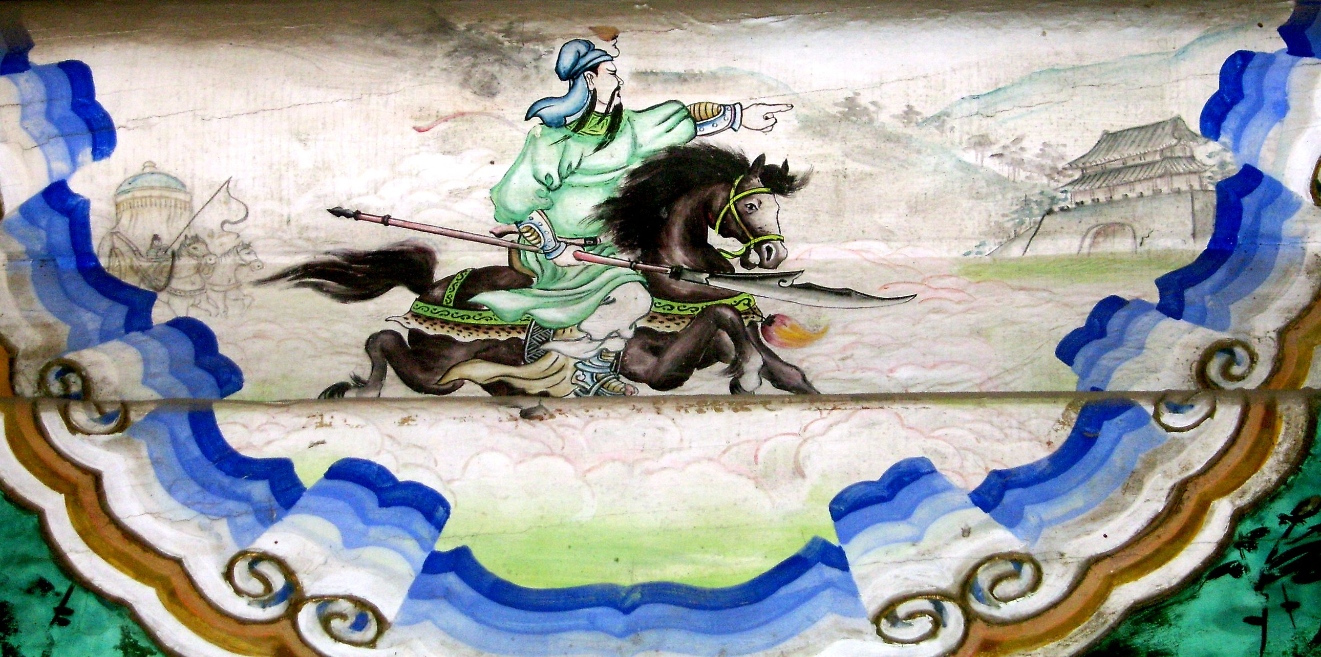 关云长千里走单骑 - 颐和园